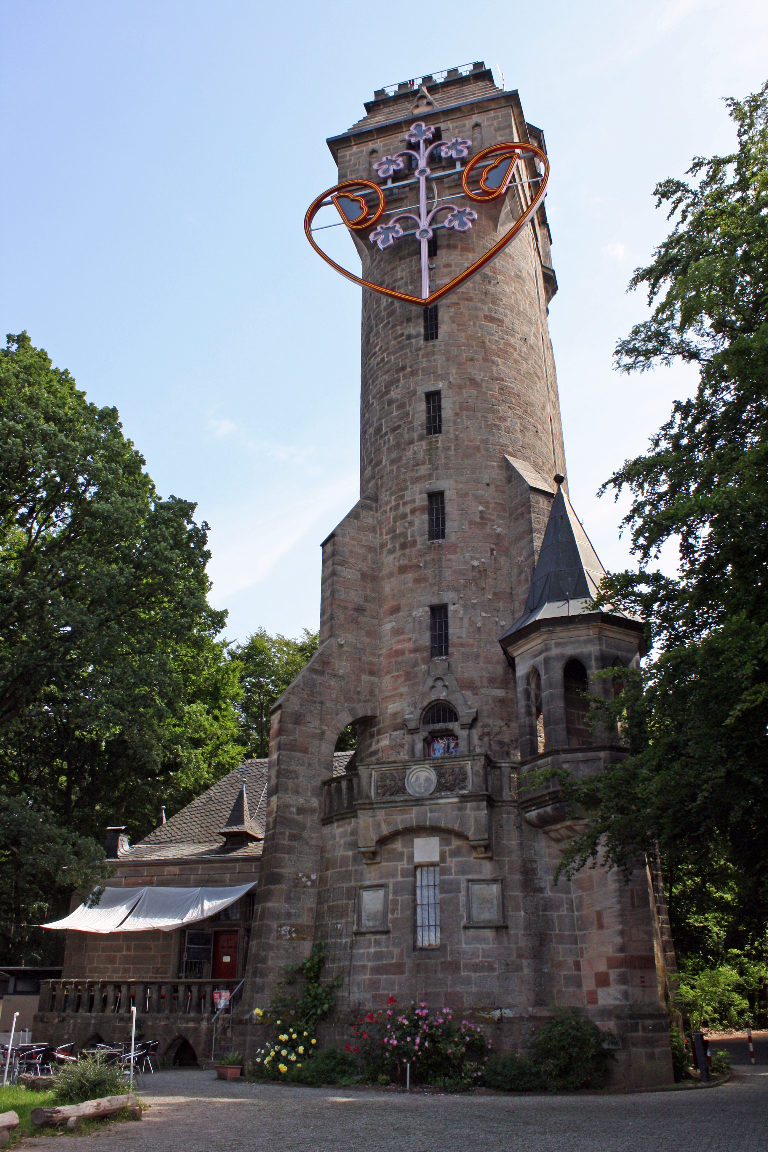 Der Spiegelslustturm auf den Marburger Lahnbergen, von Westen